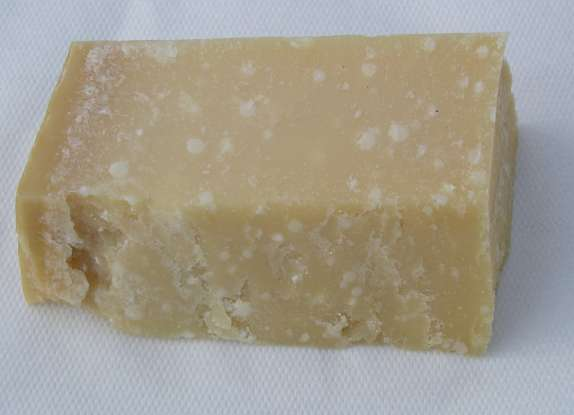 Parmesan (fromage italien)